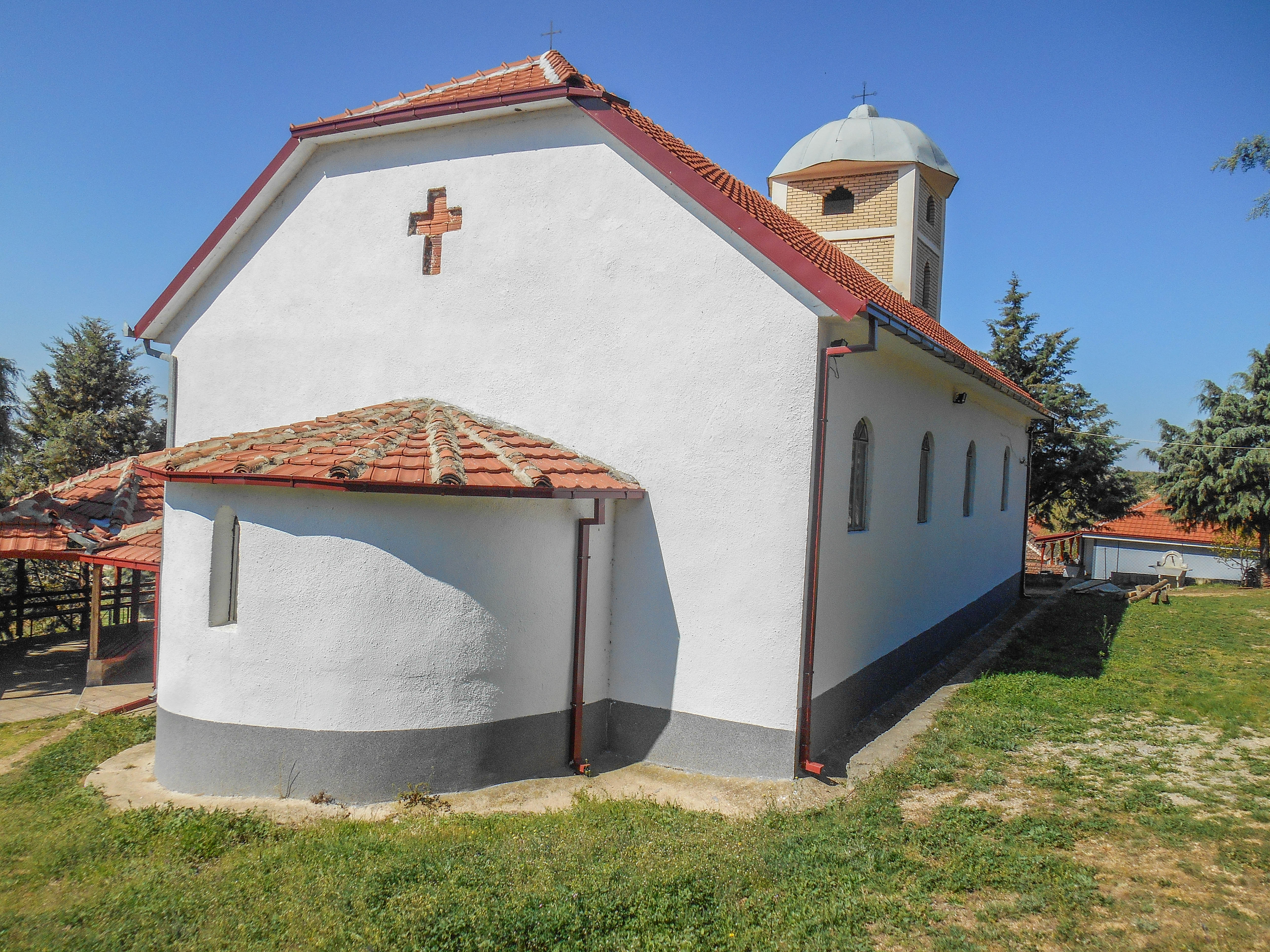 Црква „Св. Ѓорѓи“ - Дрвош